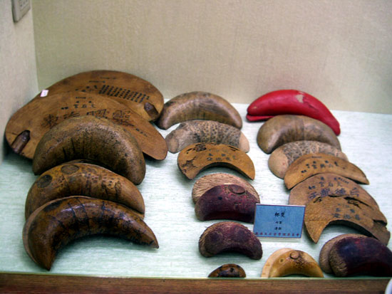 清朝保留至今的筊杯, 地點是台灣彰化縣鹿港天后宮